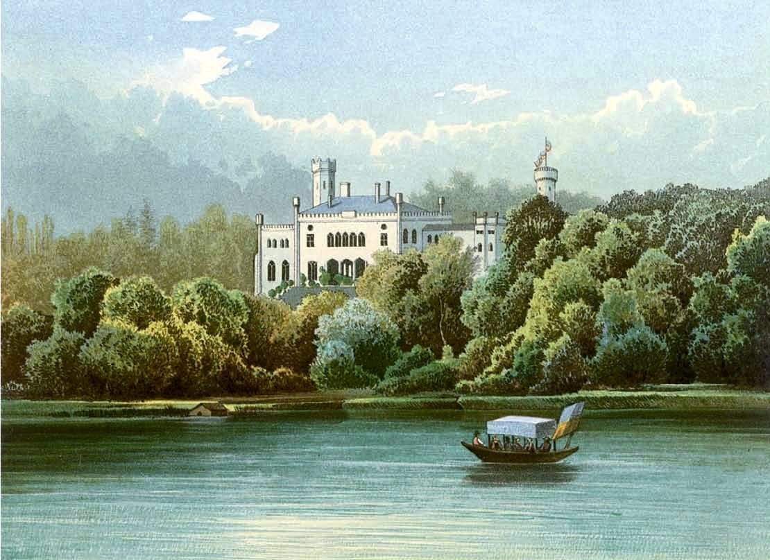 Schloss Falkenhagen, Kreis Lebus, Provinz Brandenburg, Lithographie von Alexander Duncker, 1869